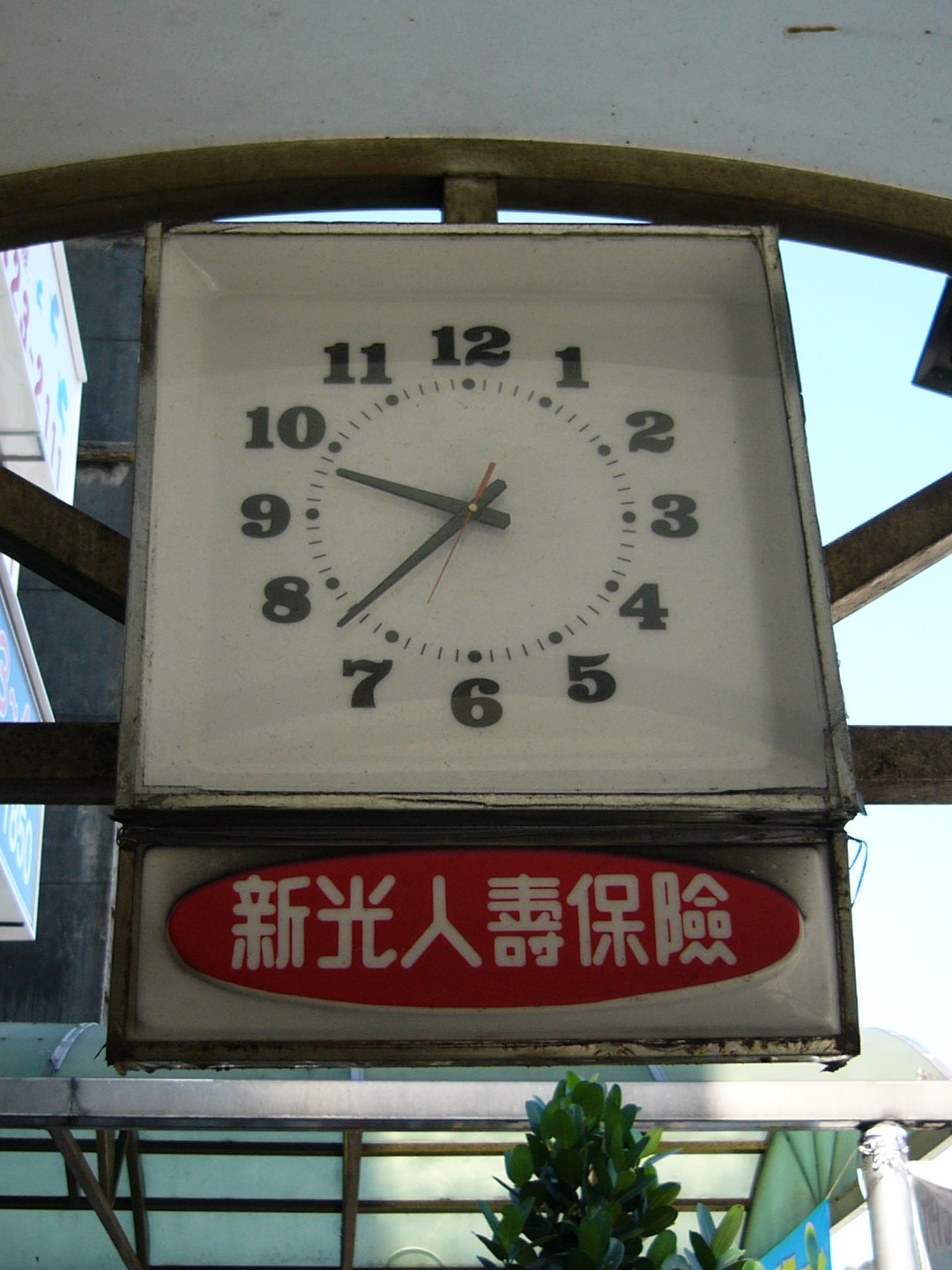 中文（台灣）: 基隆客運忠一路候車亭設置的新光人壽廣告鐘，鐘面下方是燈箱。